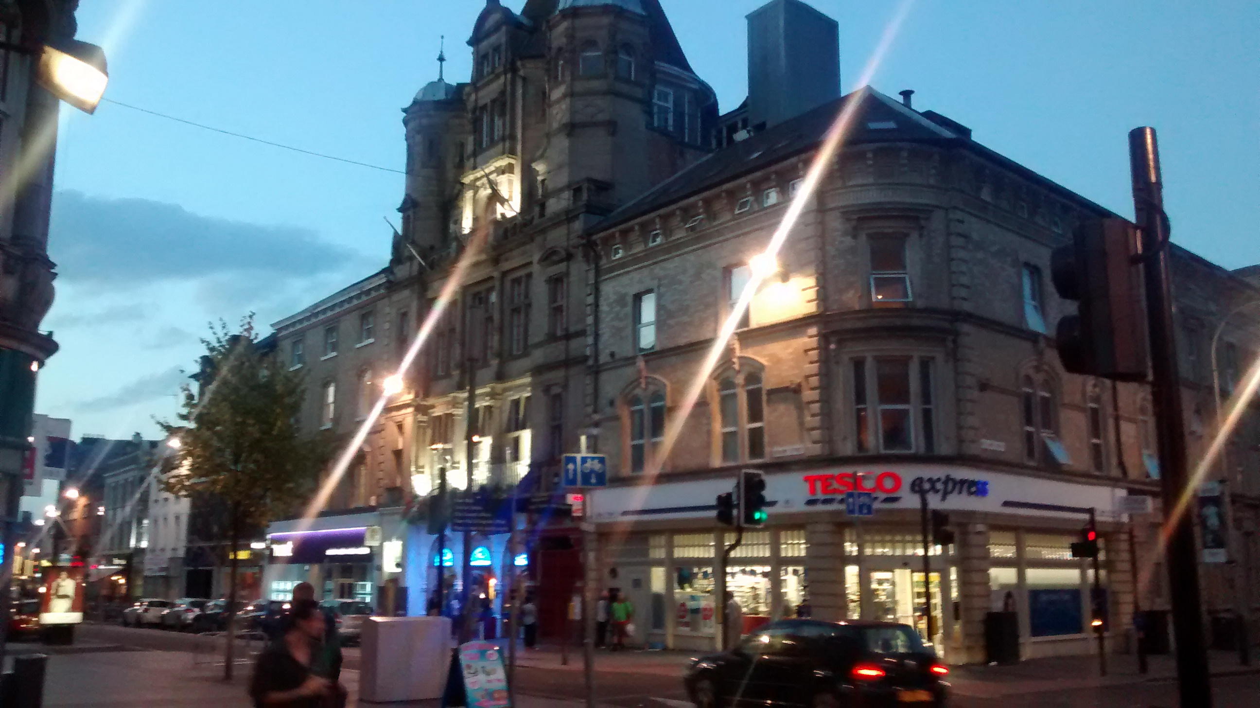 Centrum Leicester